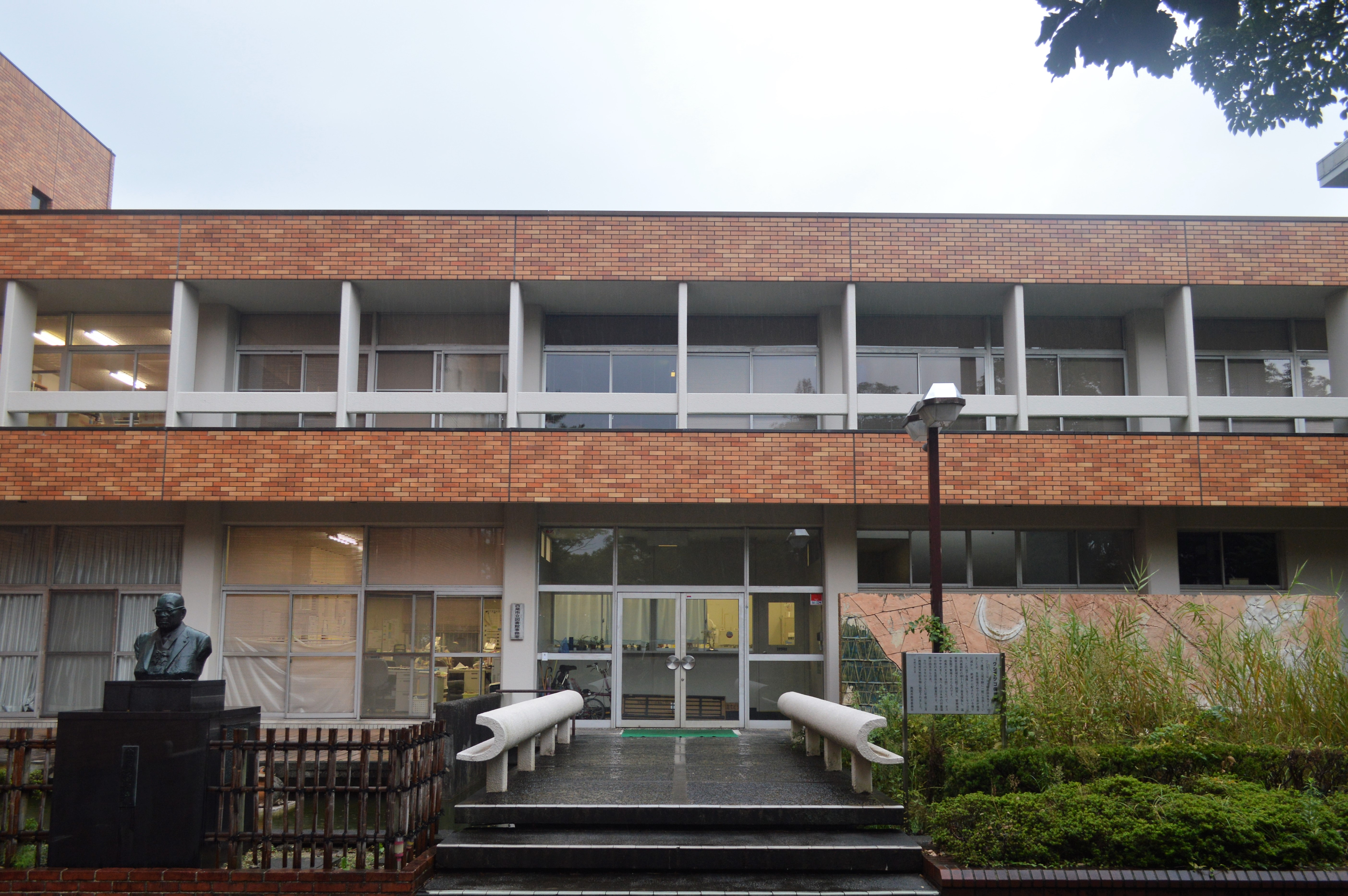 西尾市立図書館旧館（かつての西尾市郷土館、現・西尾市立図書館事務室）。1967年竣工。